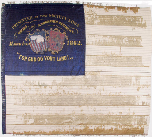 Flagget ble donert til 15th Wisconsin Volunteer Infantry den 1. mars 1862 av Society Nora i Chicago, Illinois, da regimentet passerte gjennom Chicago på vei til fronten. Det blå feltet i venstre hjørne har maling på begge sider. På froten sier teksten i det blå feltet: Presented by the Society Nora of Chicago to the Scandinavien [sic] Regiment. March 1st, 1862. "For Gud og Vort Land!" De to skjoldene er det amerikanske flagget og det norske riksvåpenet. Den bakre siden har 34 gullstjerner, som representerer antall stater i unionen i 1861. Society Nora, som senere ble kalt Nora Lodge No. 1, R. H. K., ble stiftet i 1860 i Chicago som en broderlig og norsk-kulturell forening. R. H. K. står for Riddere av det Hvite Kors, til ære for St. Olaf, Norges skytshelgen. Etter den amerikanske borgerkrigen ble flagget returnert til Society Nora, R. H. K. i Chicago av kaptein Henrik Anker Bjerregaard Ziegler (Henry Siegel) og løytnant Nils Gilbert på regimentets vegene. Flagget er i dag en del av Luther College Collection, på Vesterheim Norwegian-American Museum i Decorah, Iowa.